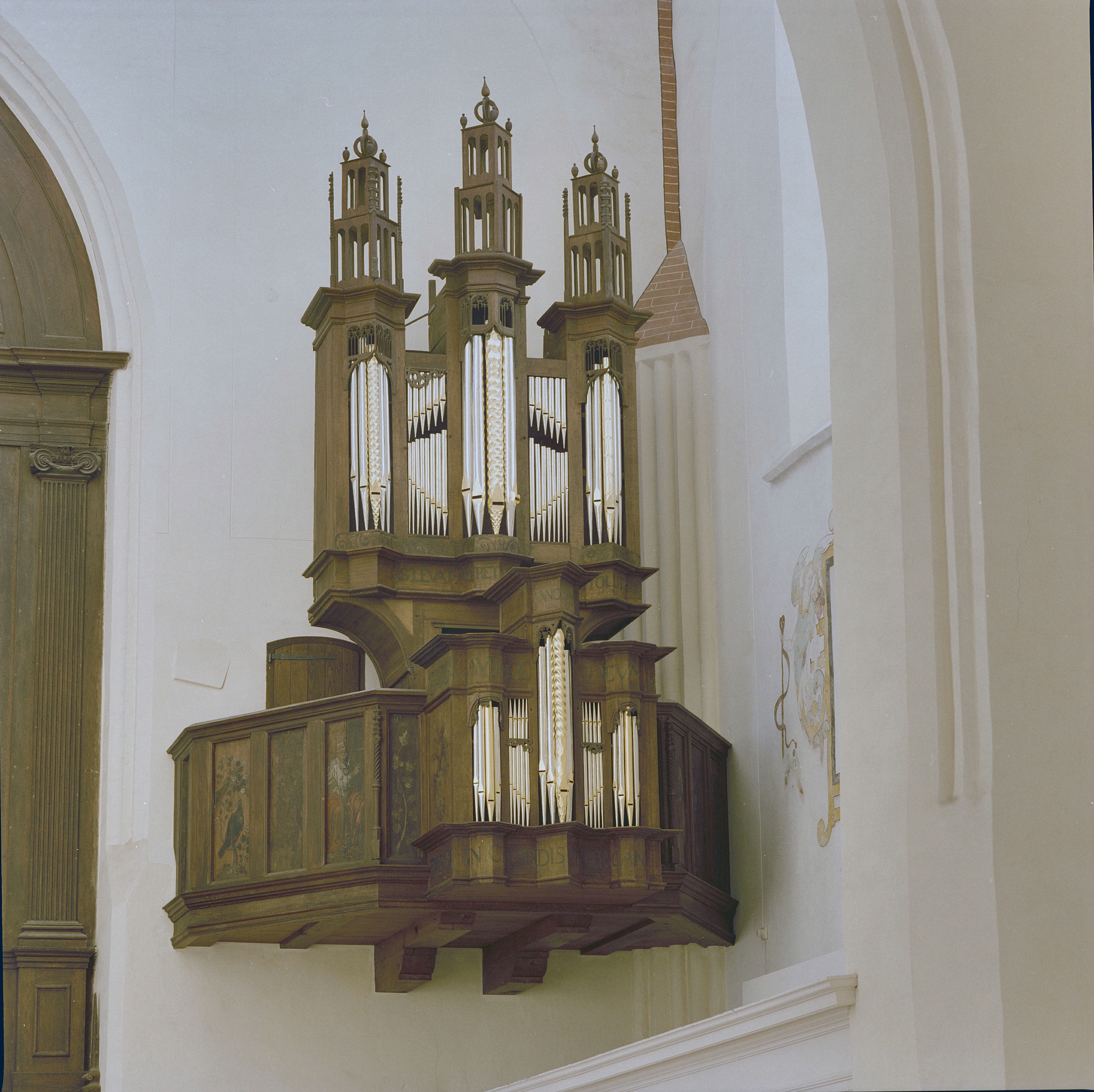 Der Aa-kerk: INTERIEUR, KLEINE ORGEL (FRONT)